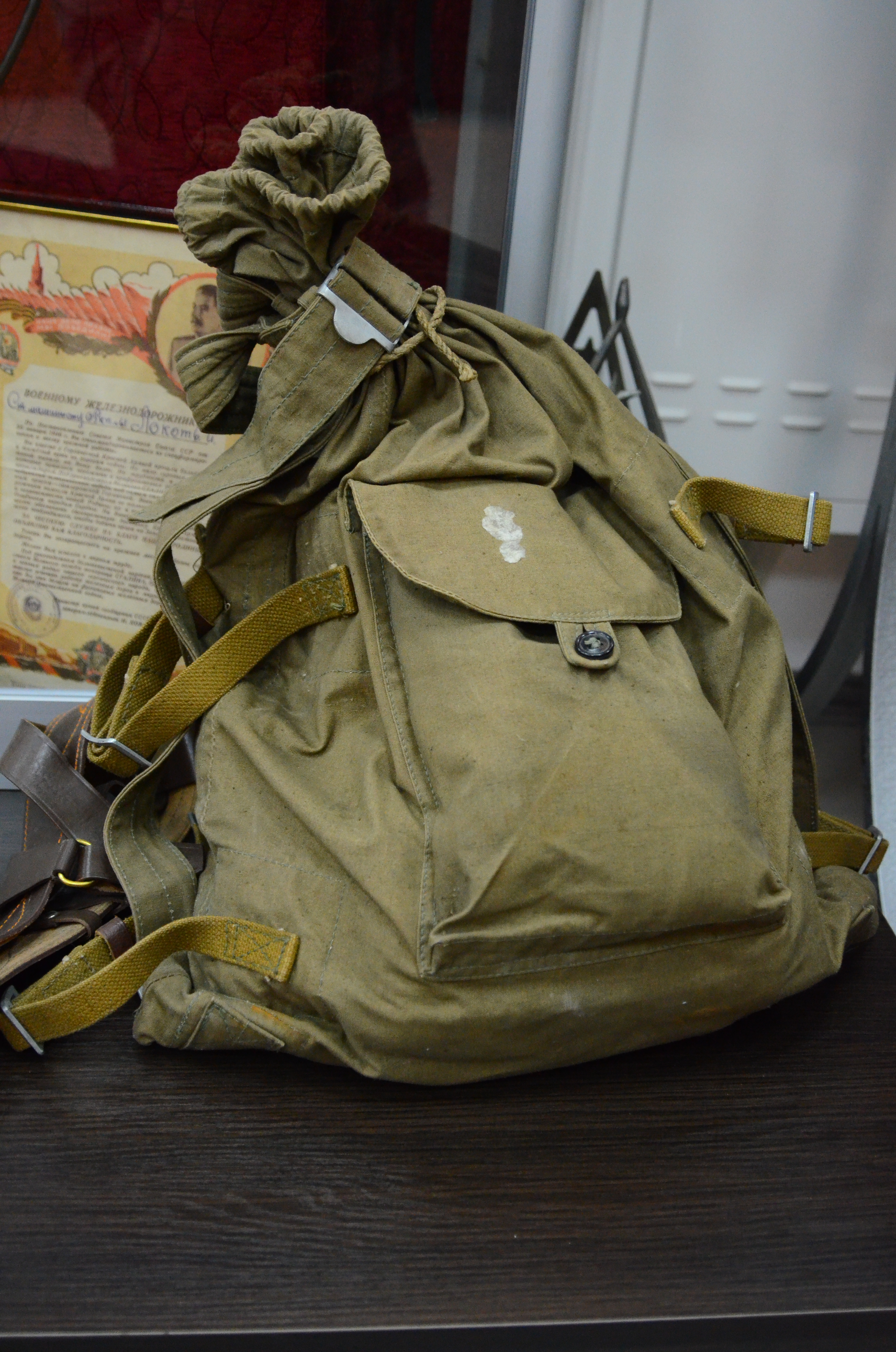 Музей историии и развития Донецкой железной дороги